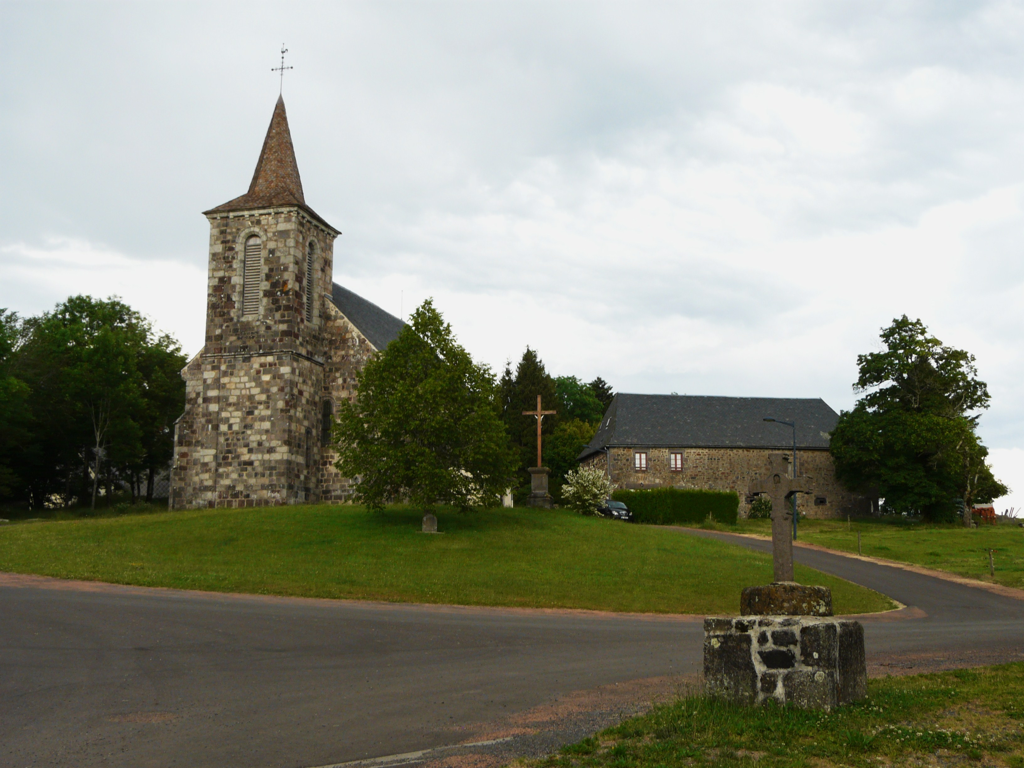 La place principale du village, Heume-l'Église, Puy-de-Dôme, France.